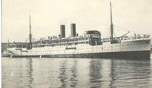 HMHS Salta.